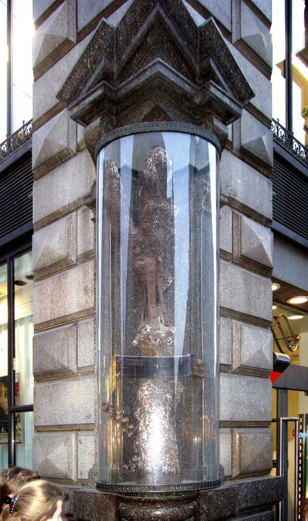 Aufgenommen am 21.02.2006 von mir (Benutzer:Gnosos) am Stock-im-Eisen Platz Wien